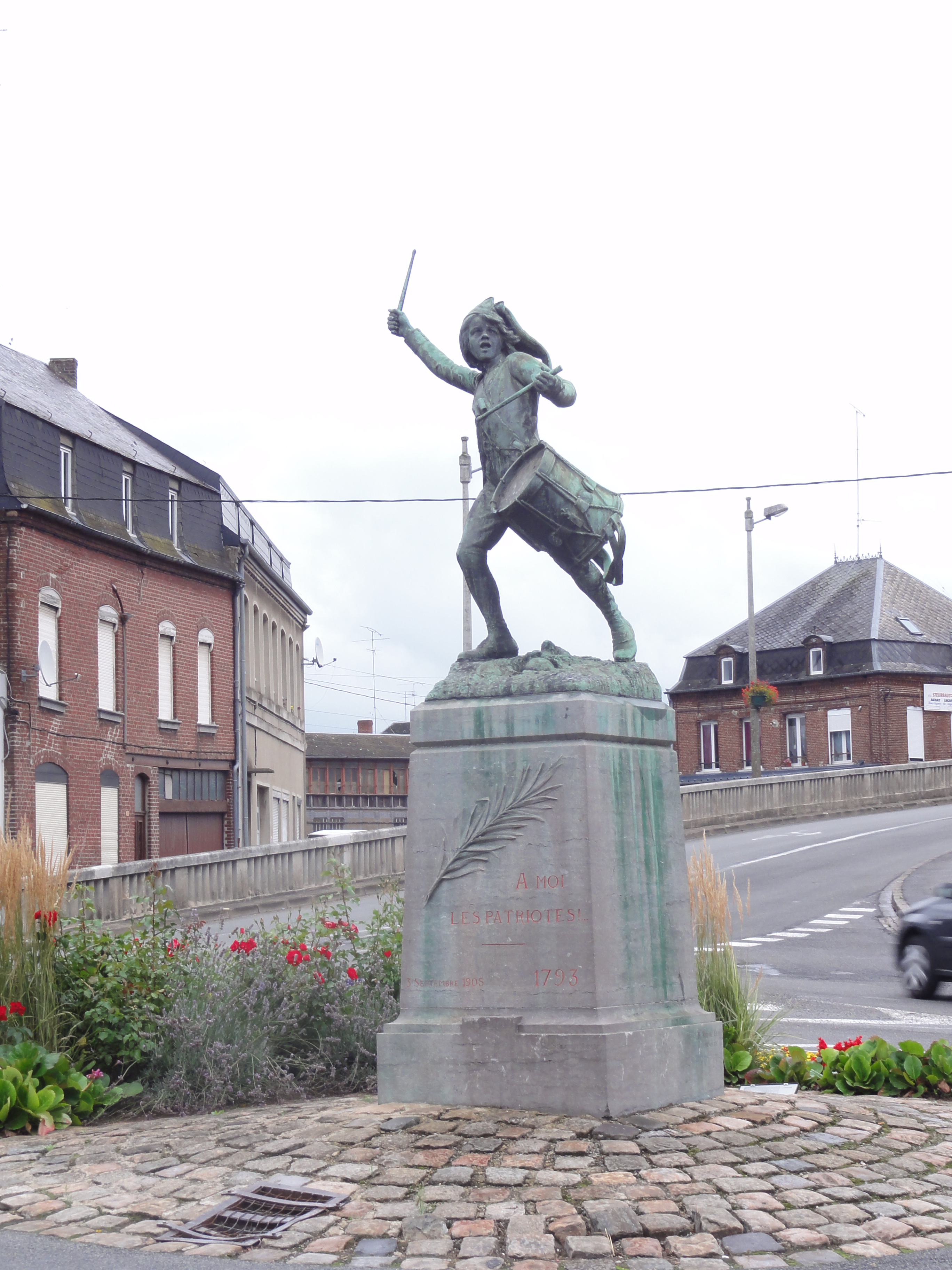 Statue du Tambour Stroh à Avesnes-sur-Helpe (Nord)